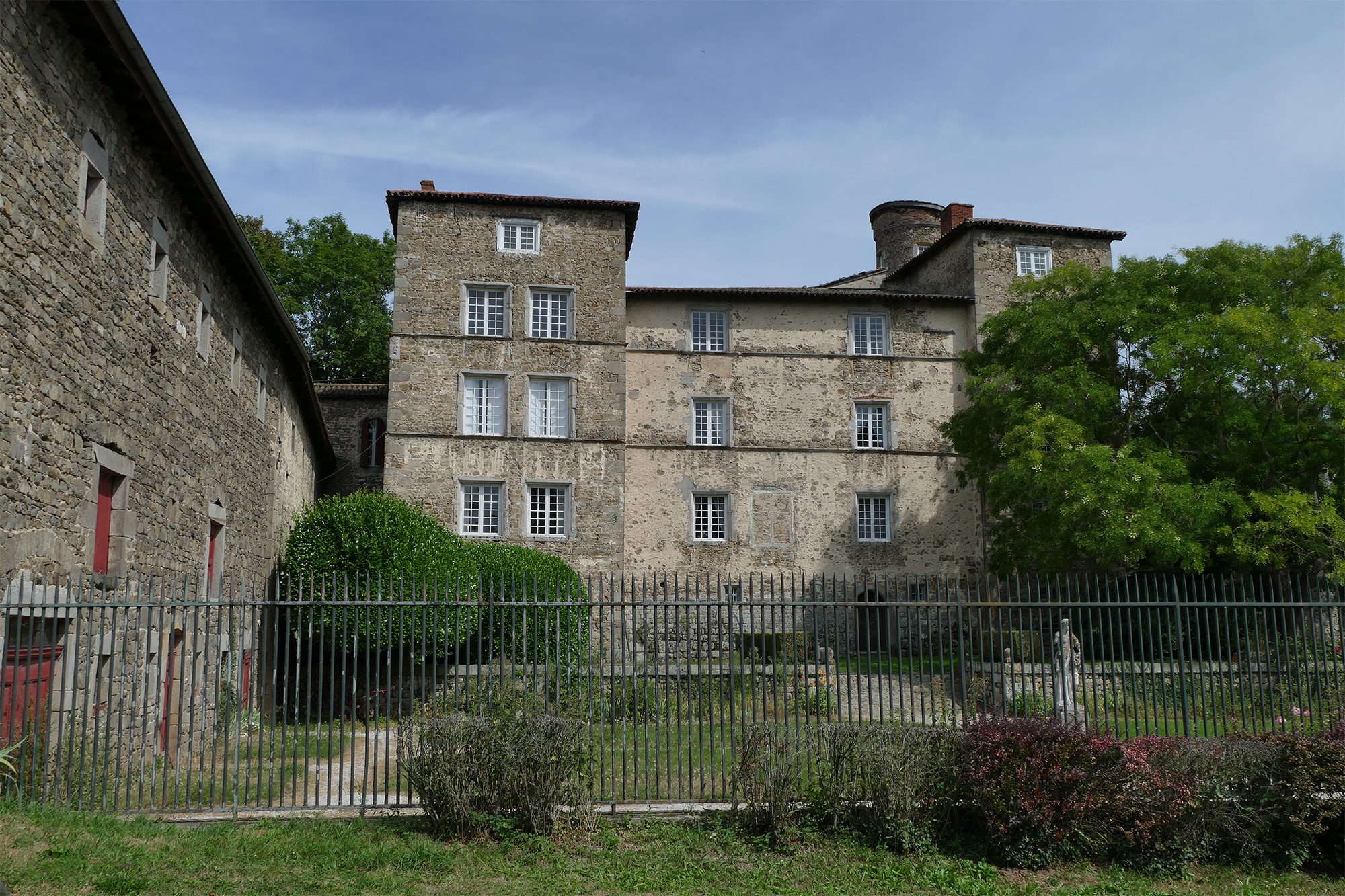 Château de Malval